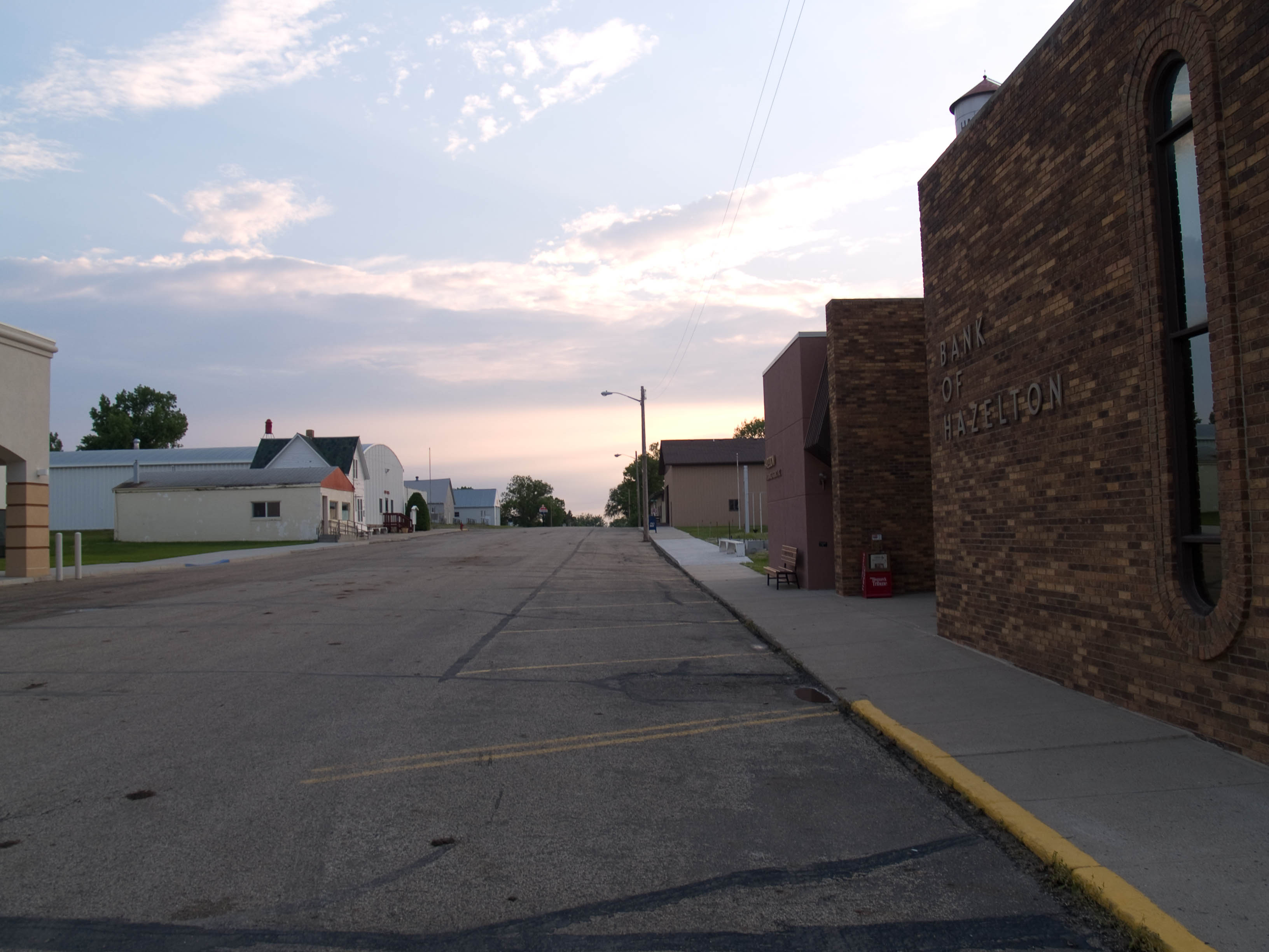 Hazelton, North Dakota